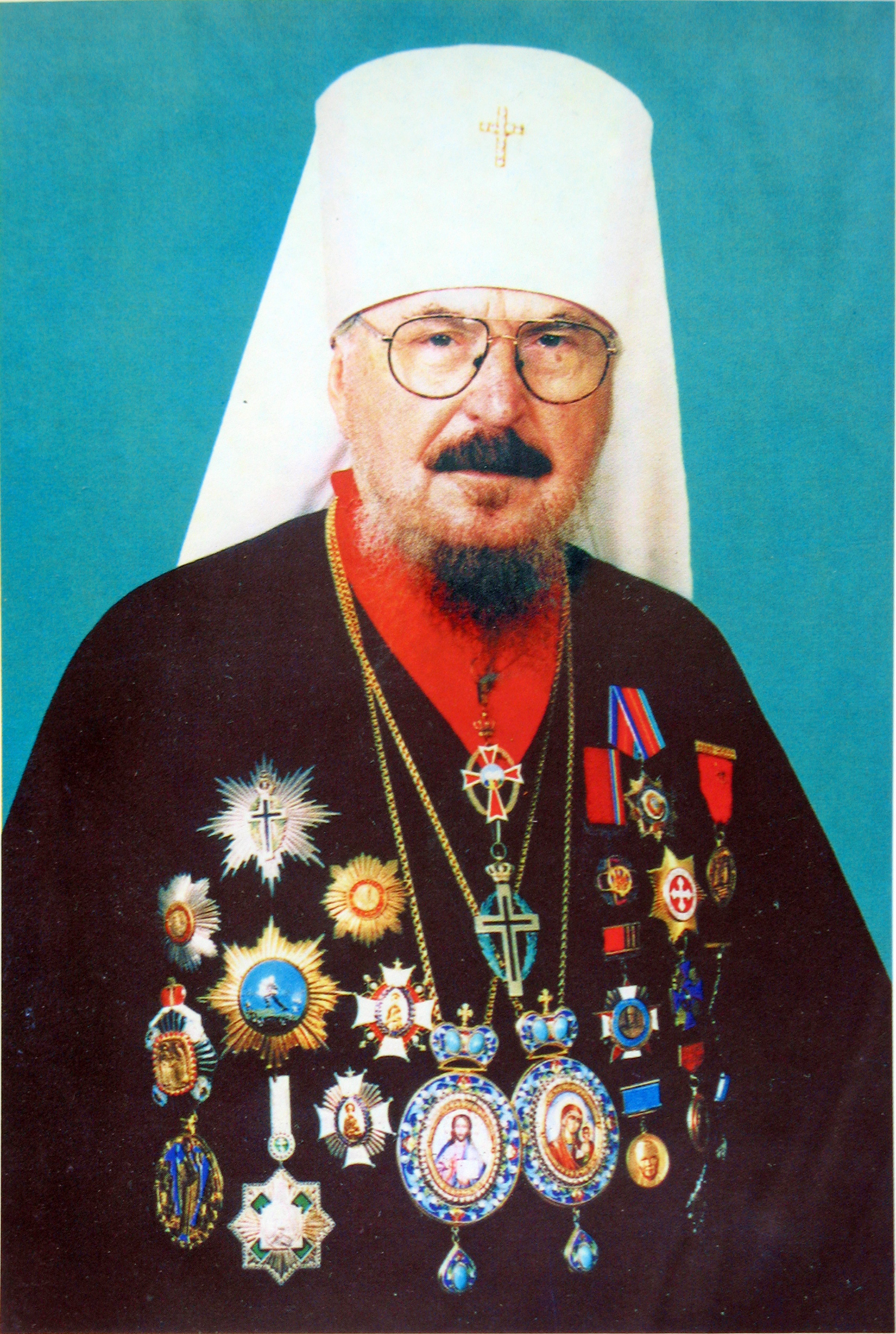 Nikodim (Rusnak) Митрополит Харьковский и Богодуховский Никодим (Руснак)